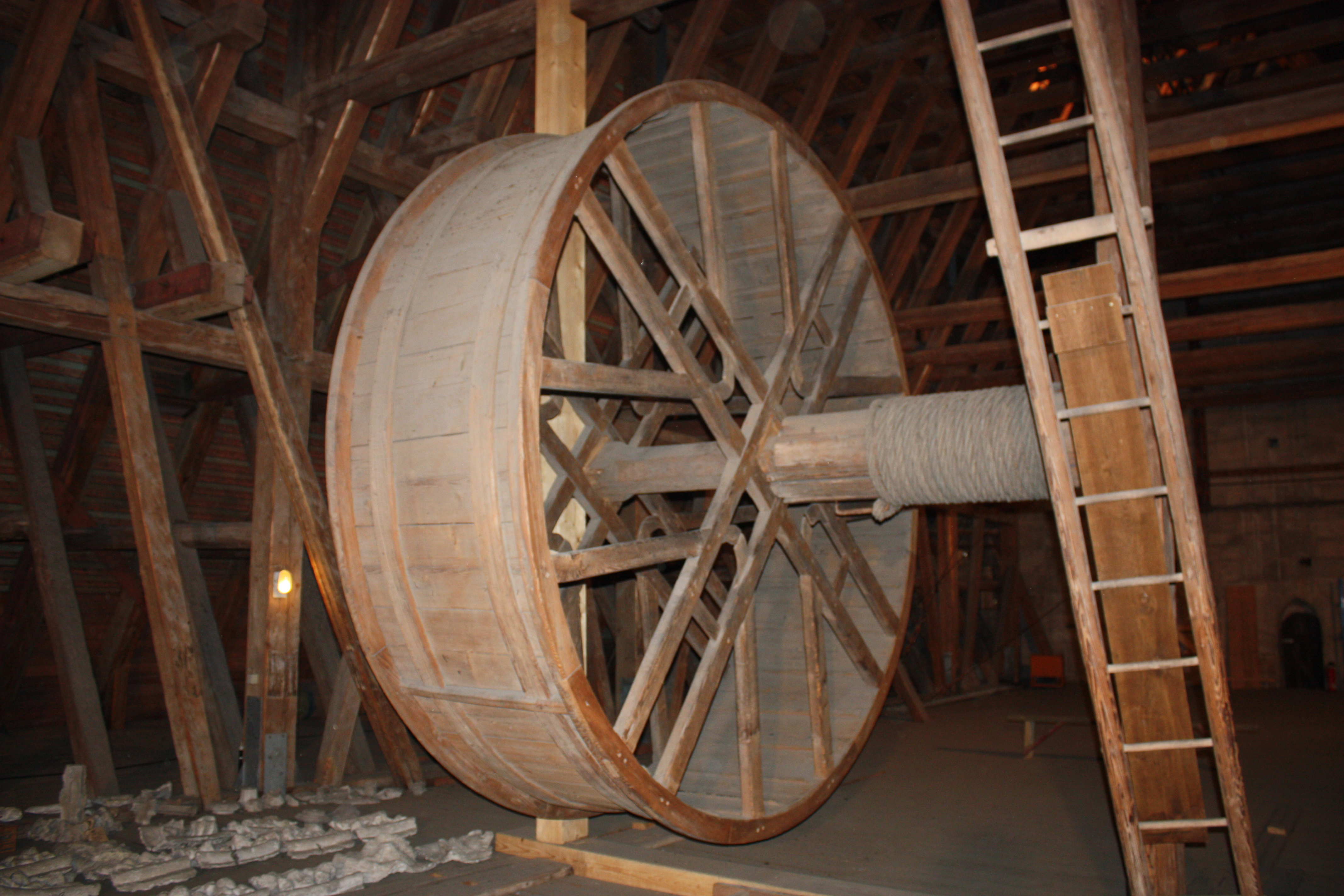 Laufrad auf dem Dach des Gmünder Münsters